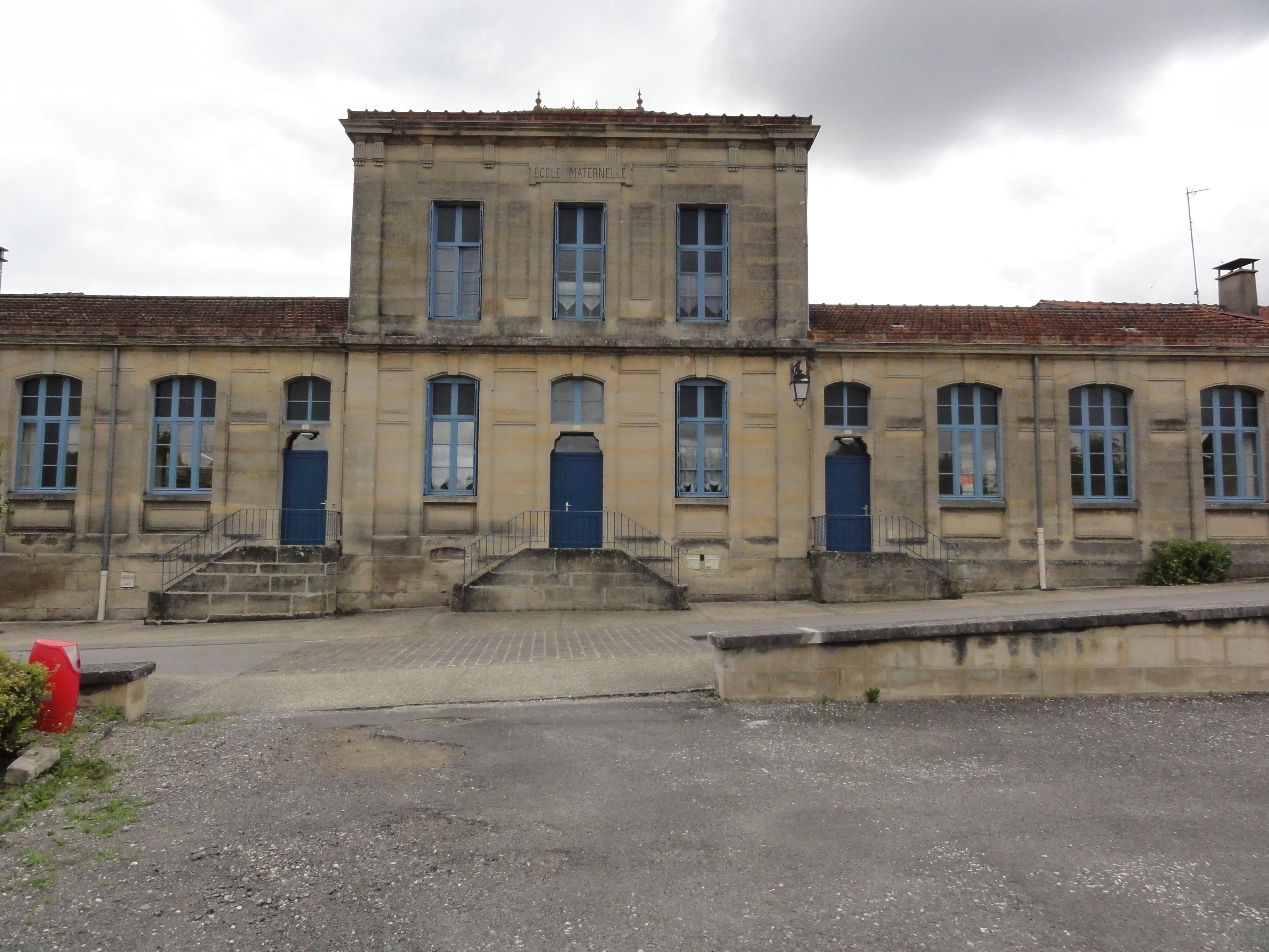 Ville-sur-Saulx (Meuse) école